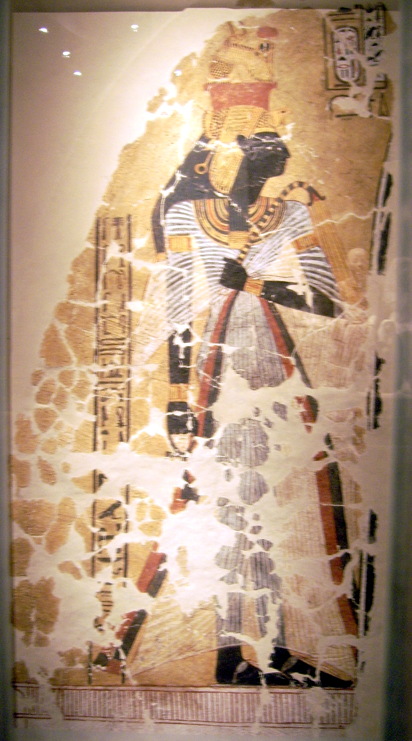 Wandmalerei aus einem Grab: Amenophis I.' Mutter Ahmes-Nefertari; Neues Reich, 20. Dynastie, um 1190/80 v. Chr.; Malerei auf Nilschlammputz; Inv.-Nr. 2080 - Ägyptisches Museum Berlin/Altes Museum